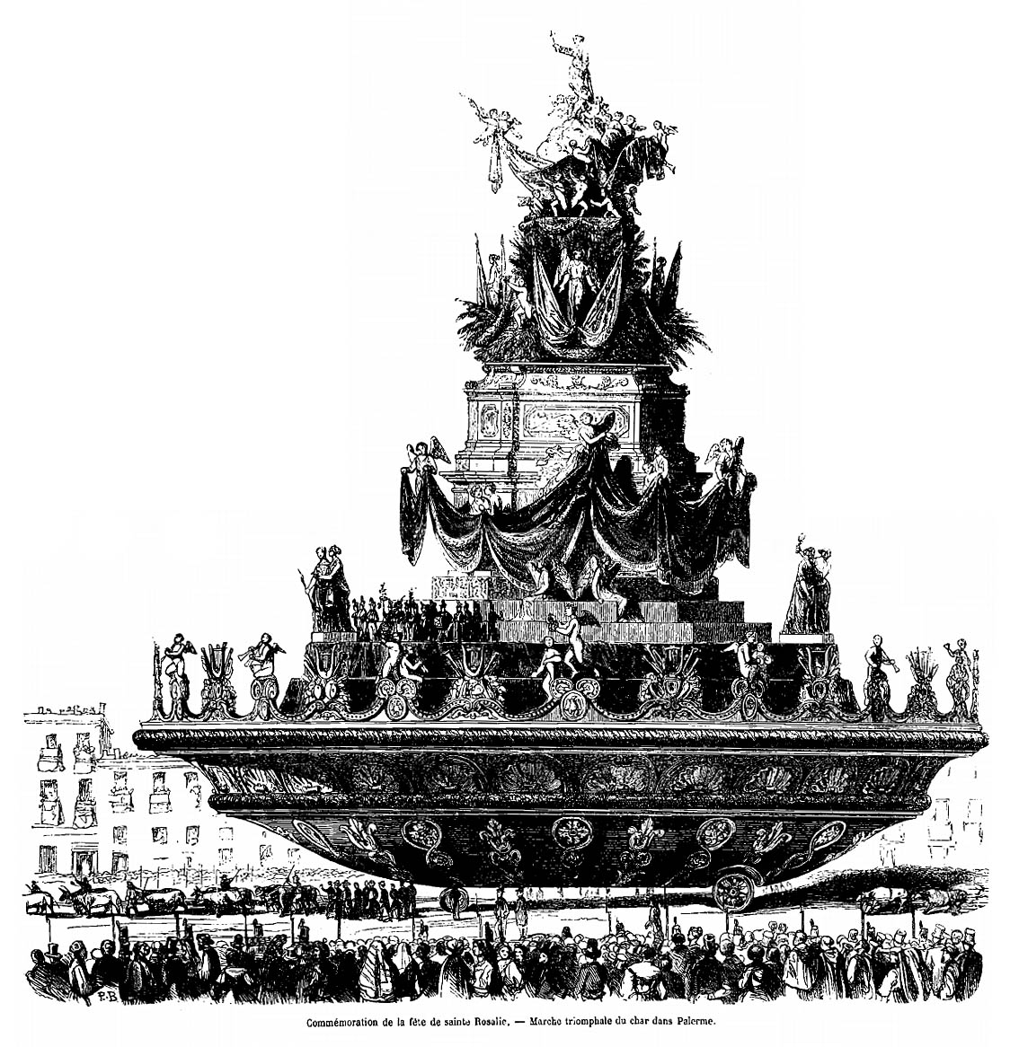 Carro trionfale di Santa Rosalia a Palermo - Illustrazione di P. B. dalla rivista francese "L'illustration" del 27 luglio 1850